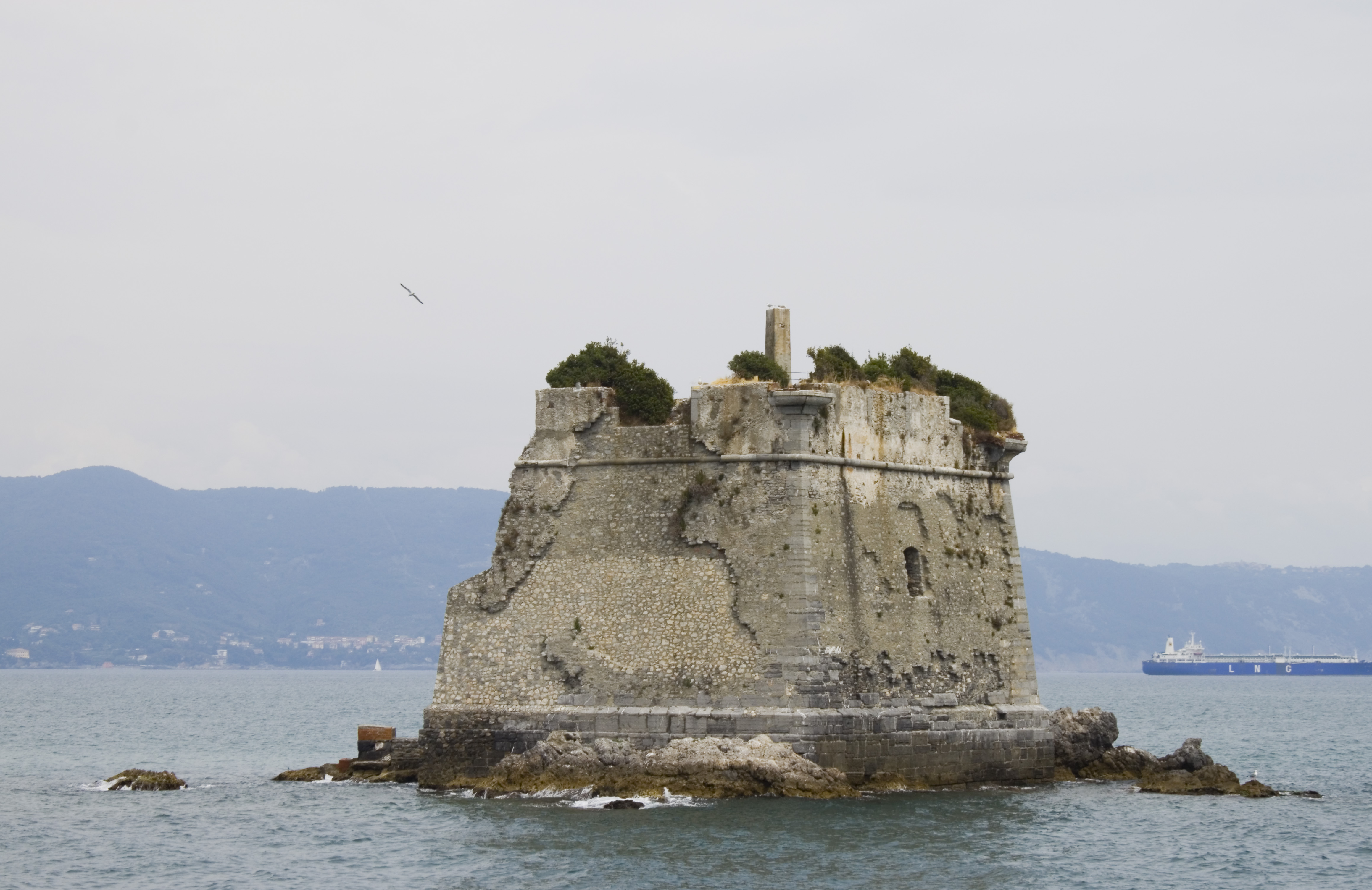 La torre Scola presso l'isola della Palmaria, Porto Venere, Liguria, Italy